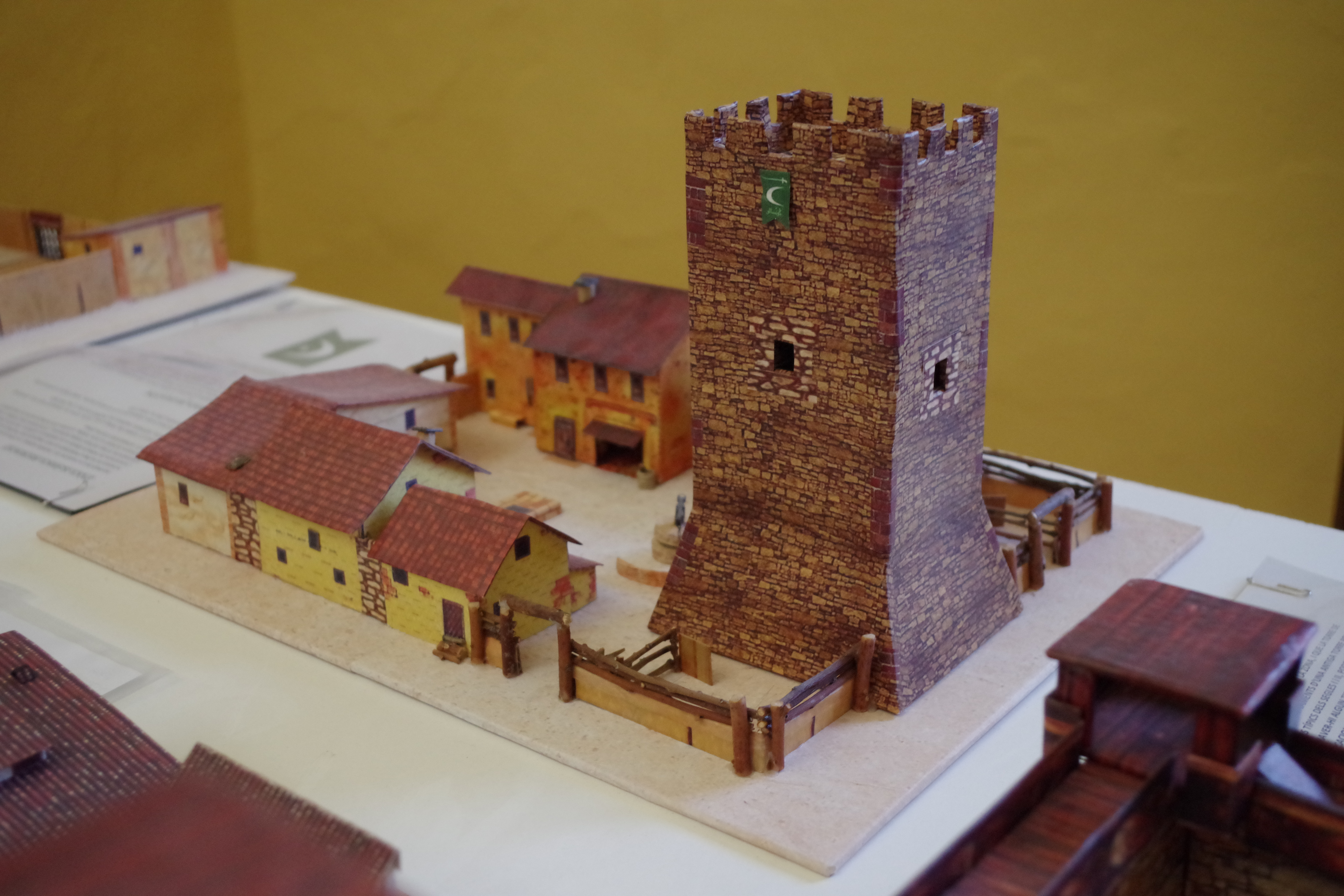 Maqueta d'el Castell d'Olocau (època islàmica)